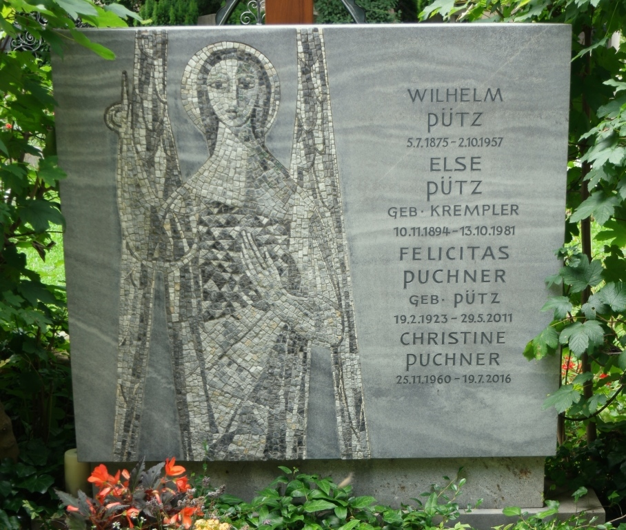 Grab des Malers und Mosaikkünstlers Wilhelm Pütz, 1875-1957, auf dem Alten Friedhof München-Solln, Friedhofweg 1